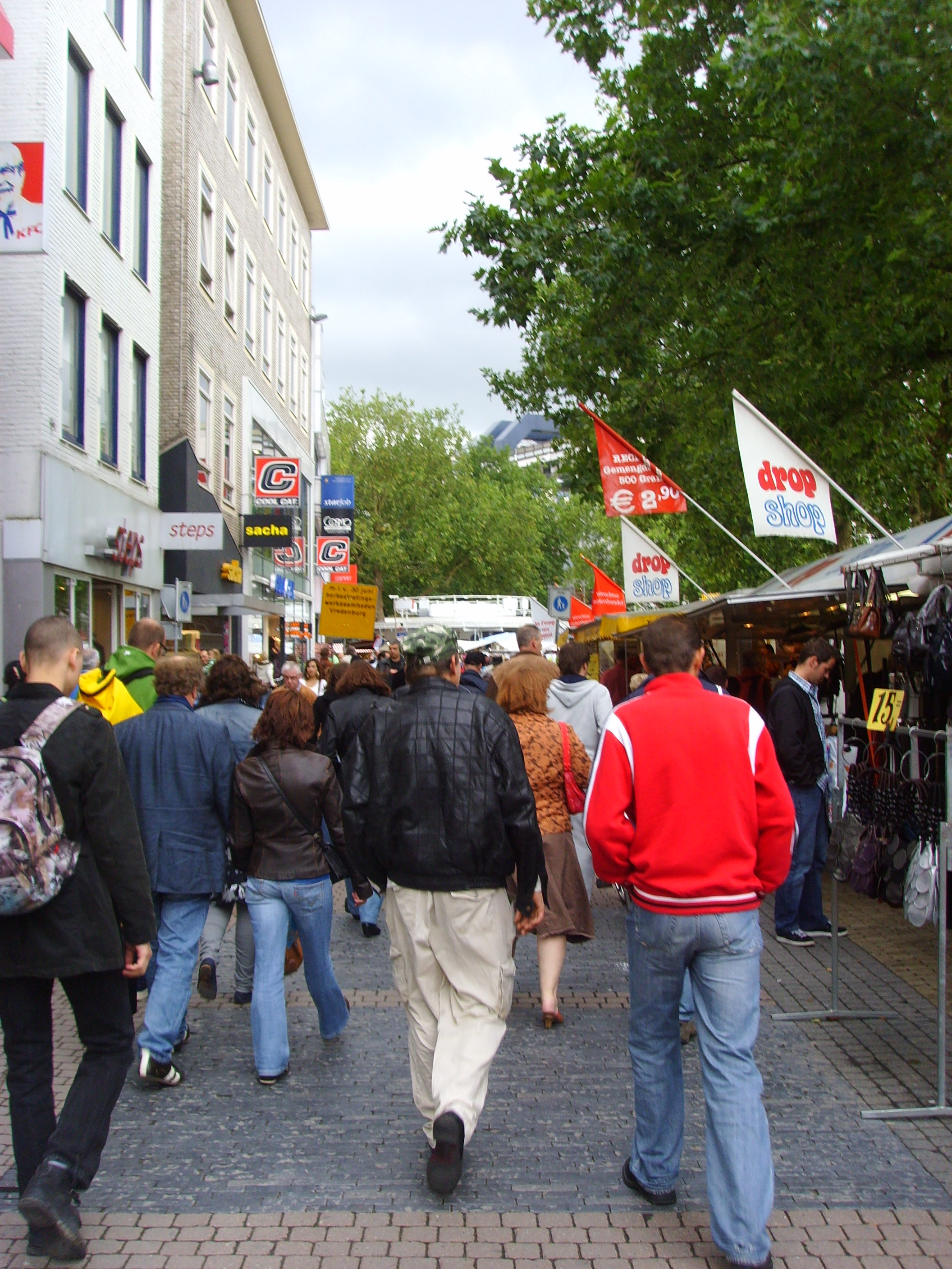 Markt op het plein Vredenburg in Utrecht